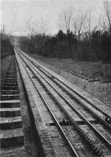 Lanová dráha na Petřín začátkem 20. století